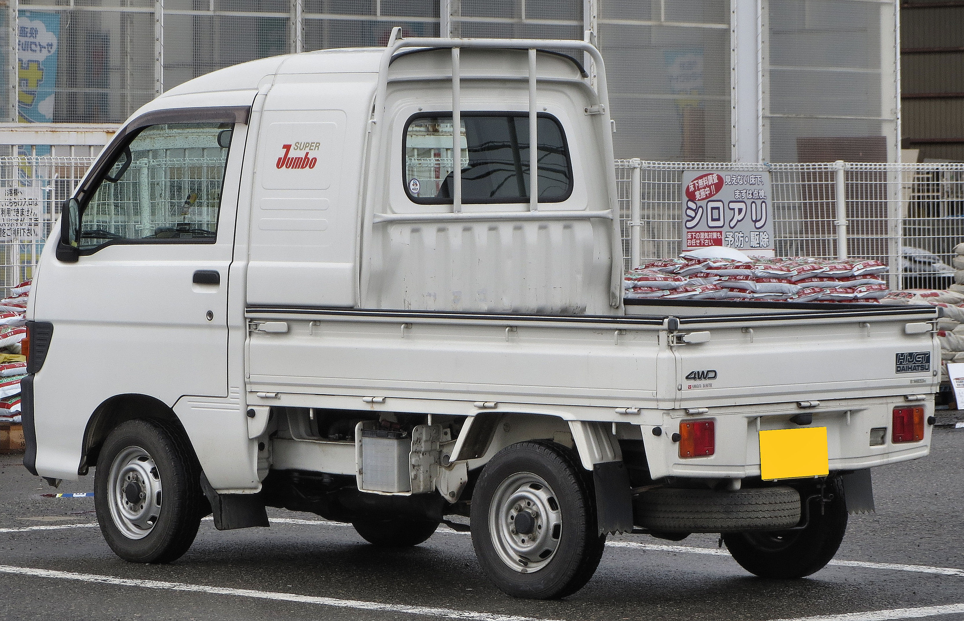 ダイハツハイゼット スーパージャンボ 4WD 5MT(8代目)